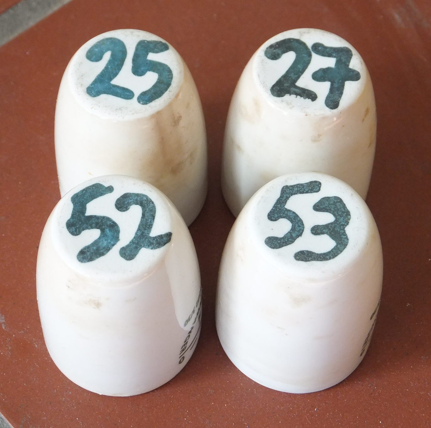 Tiegel beschriftet